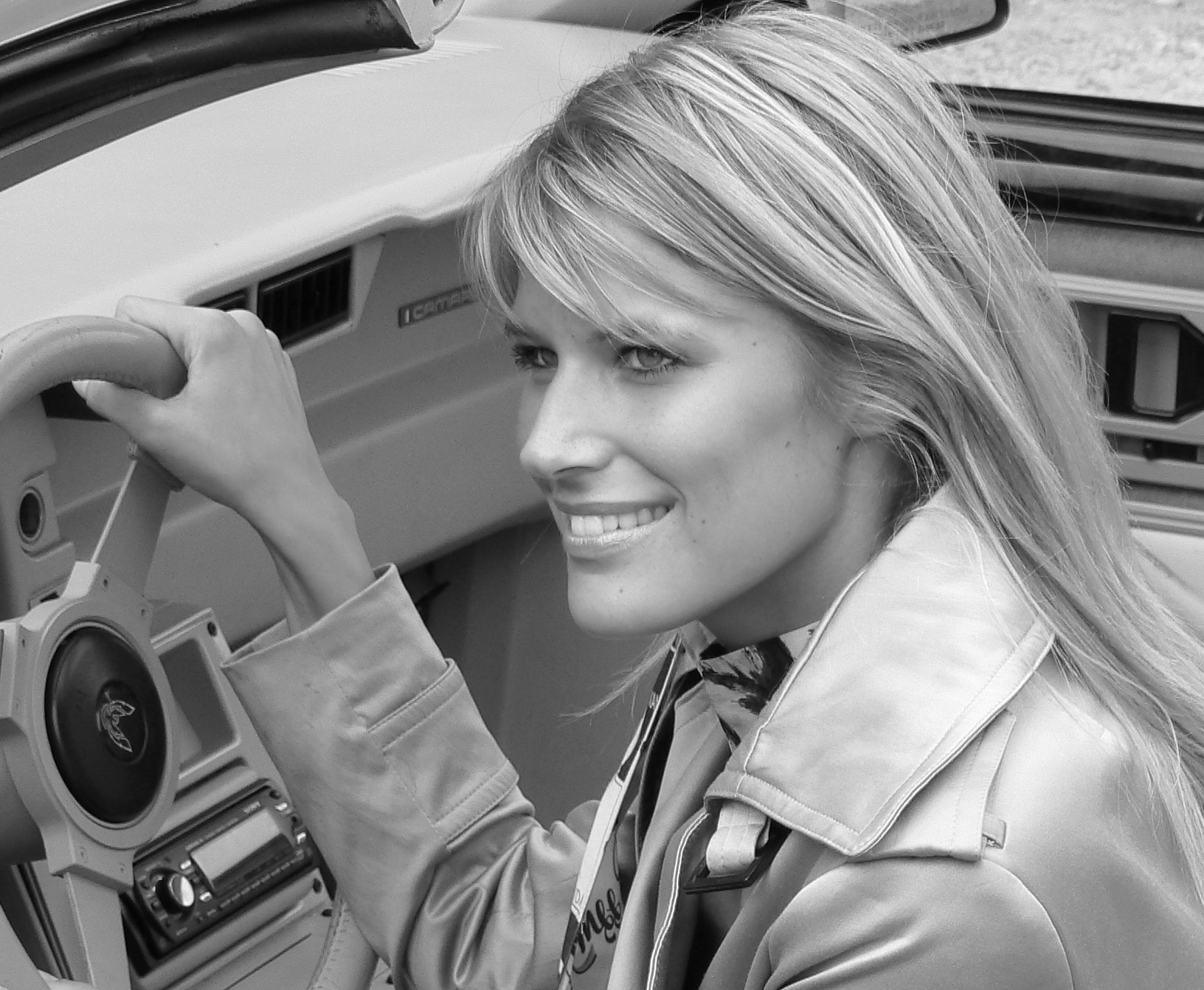 Nele Somers, miss "Belgian Beauty 2008" in B&W. Ik had nog een fotoke liggen van Nele Somers, de huidige miss Belgian Beauty. Vele kandidates kwamen verleden jaar afgezakt naar mijn gemeente. Was niet mijn topfavoriet maar toch een dame met karakter, getuige haar "ambras met Ignace" (veelbesproken groene blaadjes lustende organisator van deze miss verkiezing). Whatever. Zwart/wit gemaakt anders wat te artificieel.